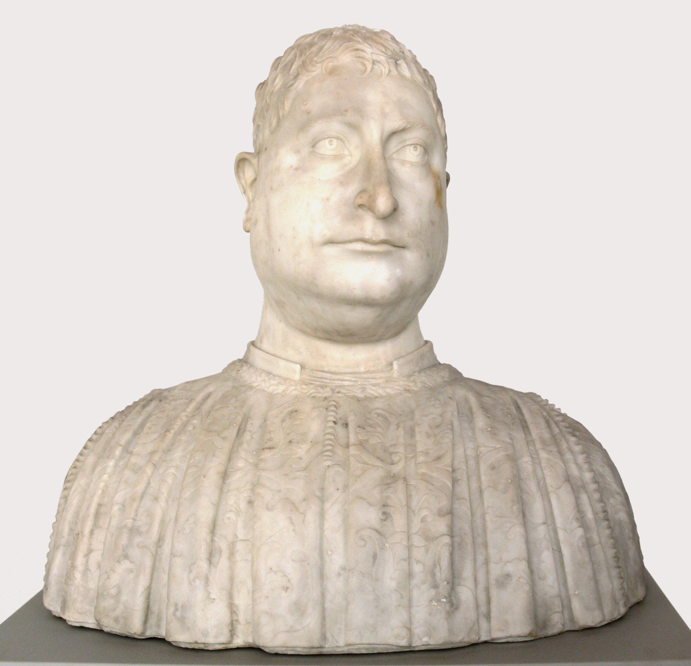 Rom